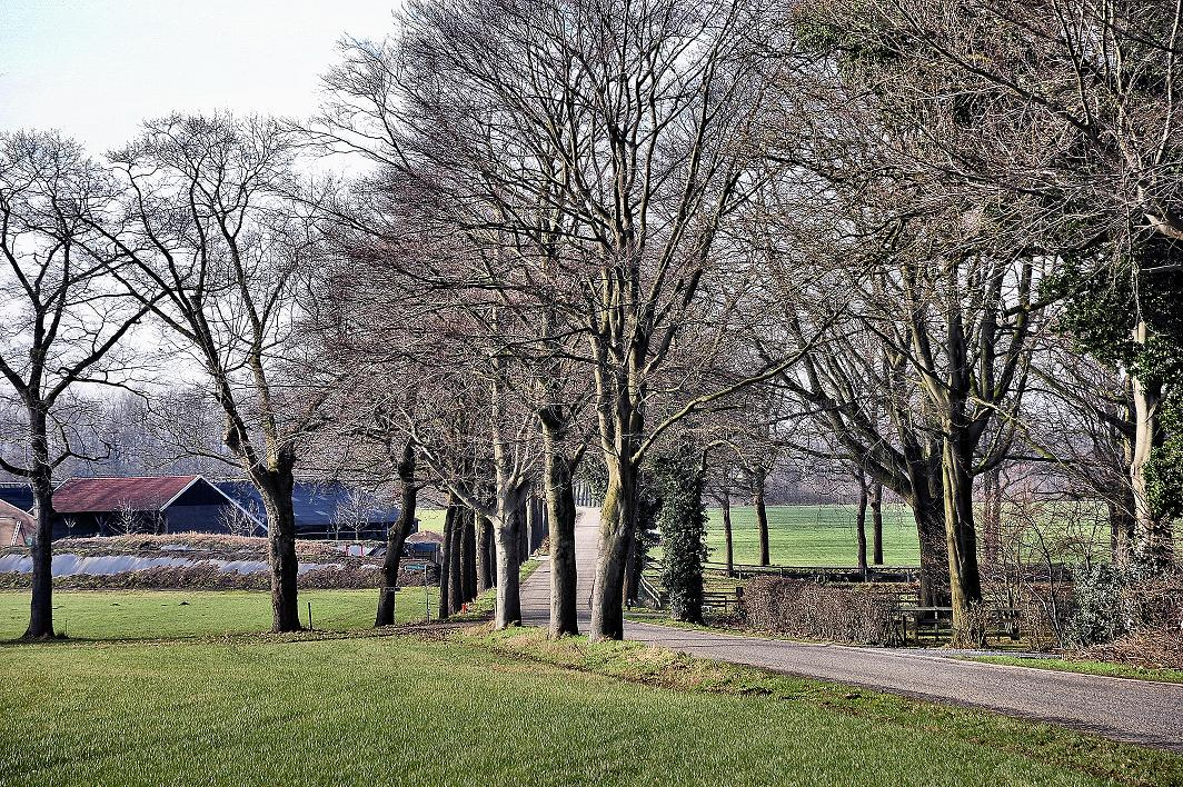 Rand Oost-Nederlands plateau, 51° 57' 45.08" N 6° 34' 50.61" E